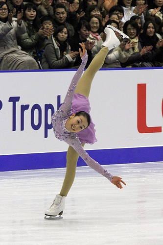 Ма́о Аса́да на 2011 NHK Trophy .